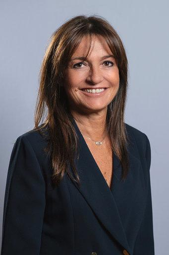 photo nco du 31/12